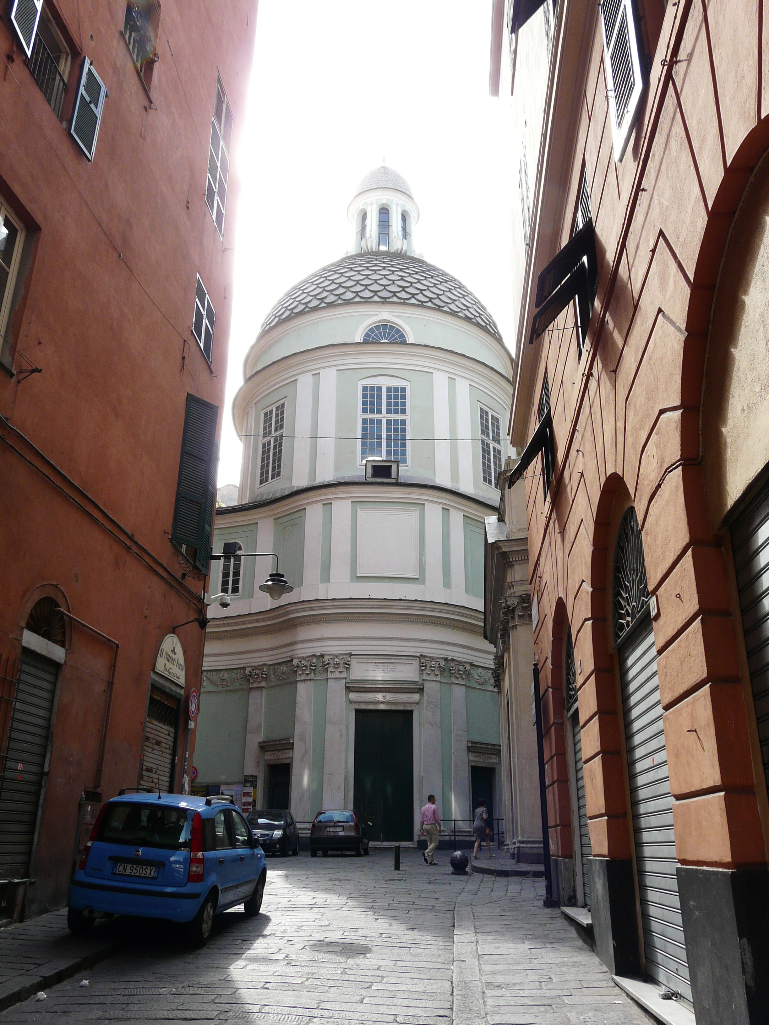 Chiesa di San Giorgio, Genova, Liguria, Italia